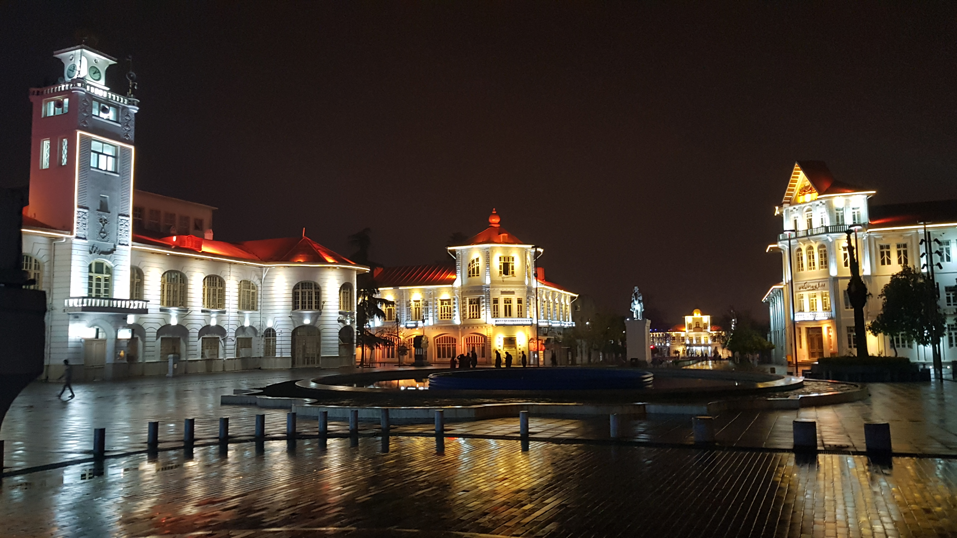 عمارت شهرداری واقع در پیاده راه شهرداری رشت در یک شب پاییزی